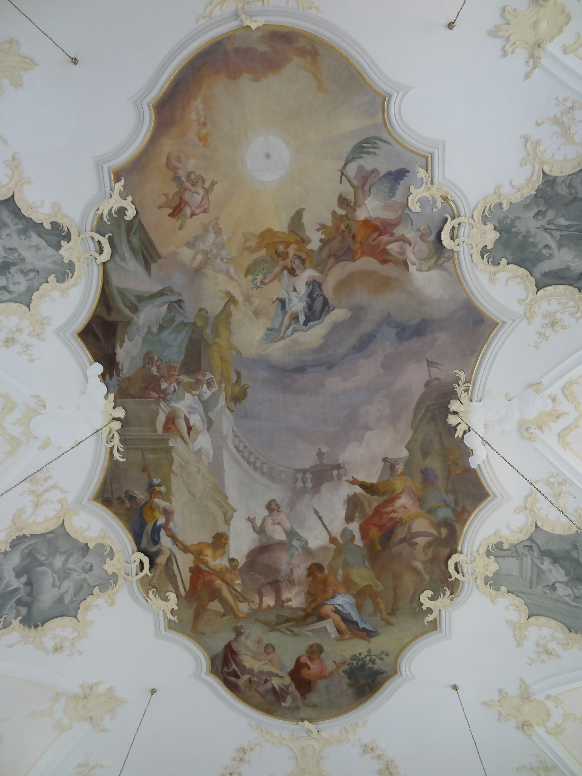 Deckenfresko im Langhaus der Pfarrkirche St. Vitus in Offenstetten (Stadt Abensberg, Landkreis Kelheim)